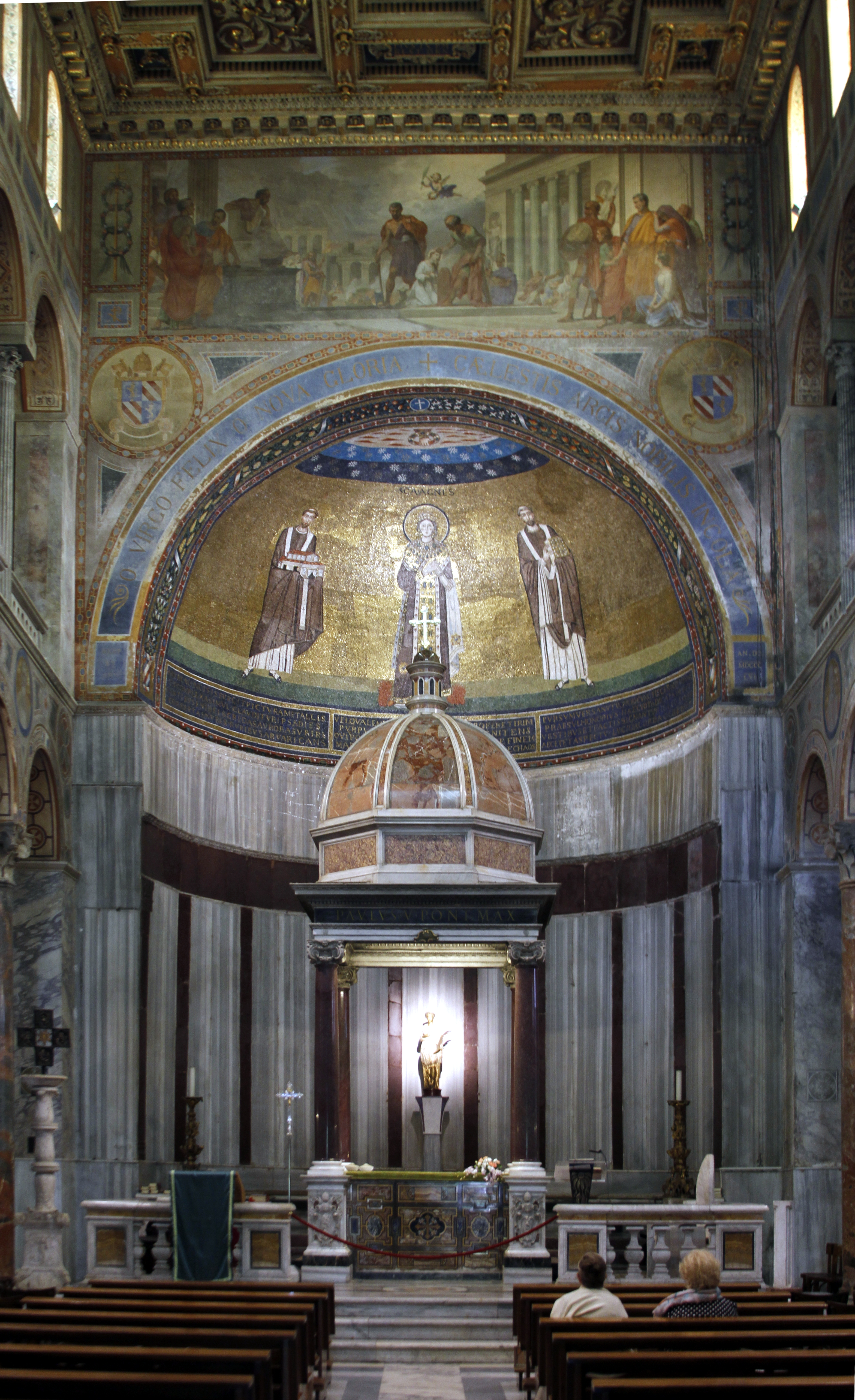 Sant'Agnese fuori le mura - Rome